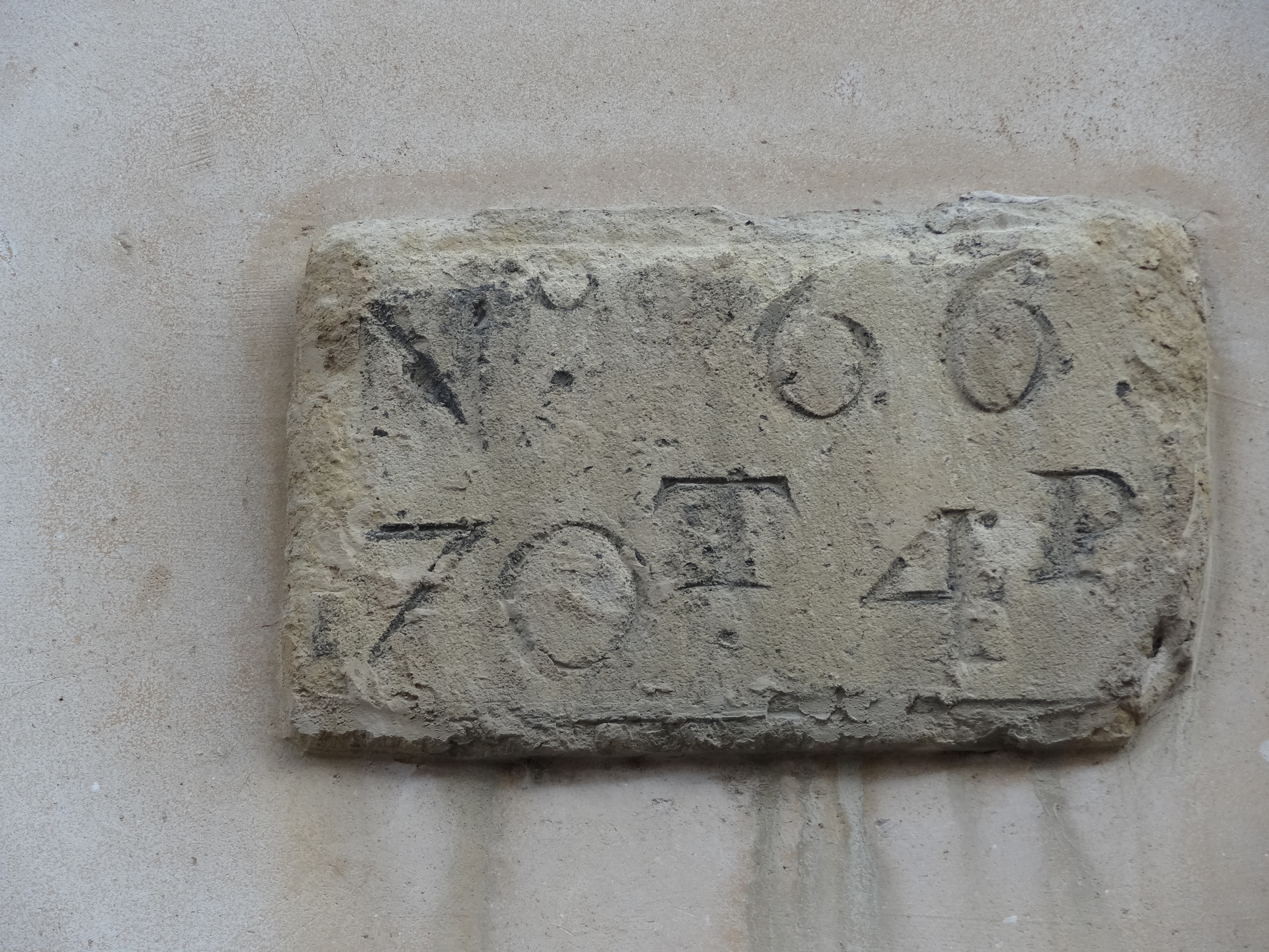 Paris 13e arrondissement - 8 rue Berbier du Mets - ancienne plaque de la Bièvre indiquant la longueur que la propriété riveraine devait entretenir (70 toises et 7 pieds)